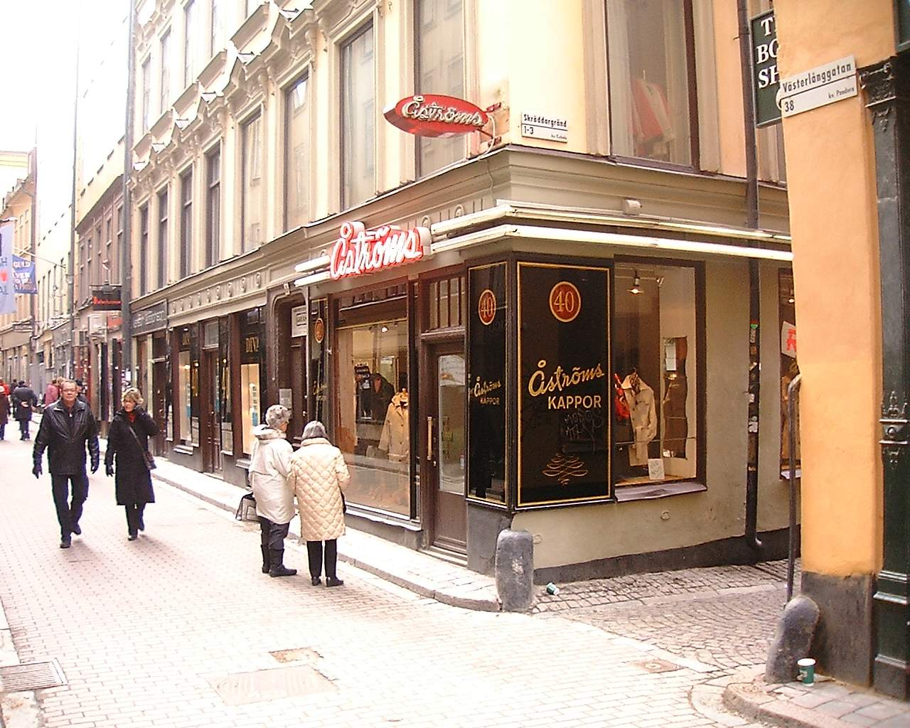 Front of 40, Västerlånggatan. Gamla stan, Stockholm.